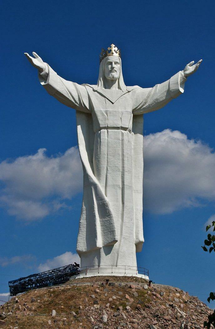 Choć na placu budowy, za figurą stoi jeszcze dźwig, miejsce zaczyna żyć swoim życiem. Wyznaczono duże parkingi mogące pomieścić kilka autokarów, toaletę, jakieś pawilony z parasolami. Powstaje powoli kolejne miejsce pielgrzymkowe. Na pewno będzie to najchętniej fotografowane miejsce w Świebodzinie.